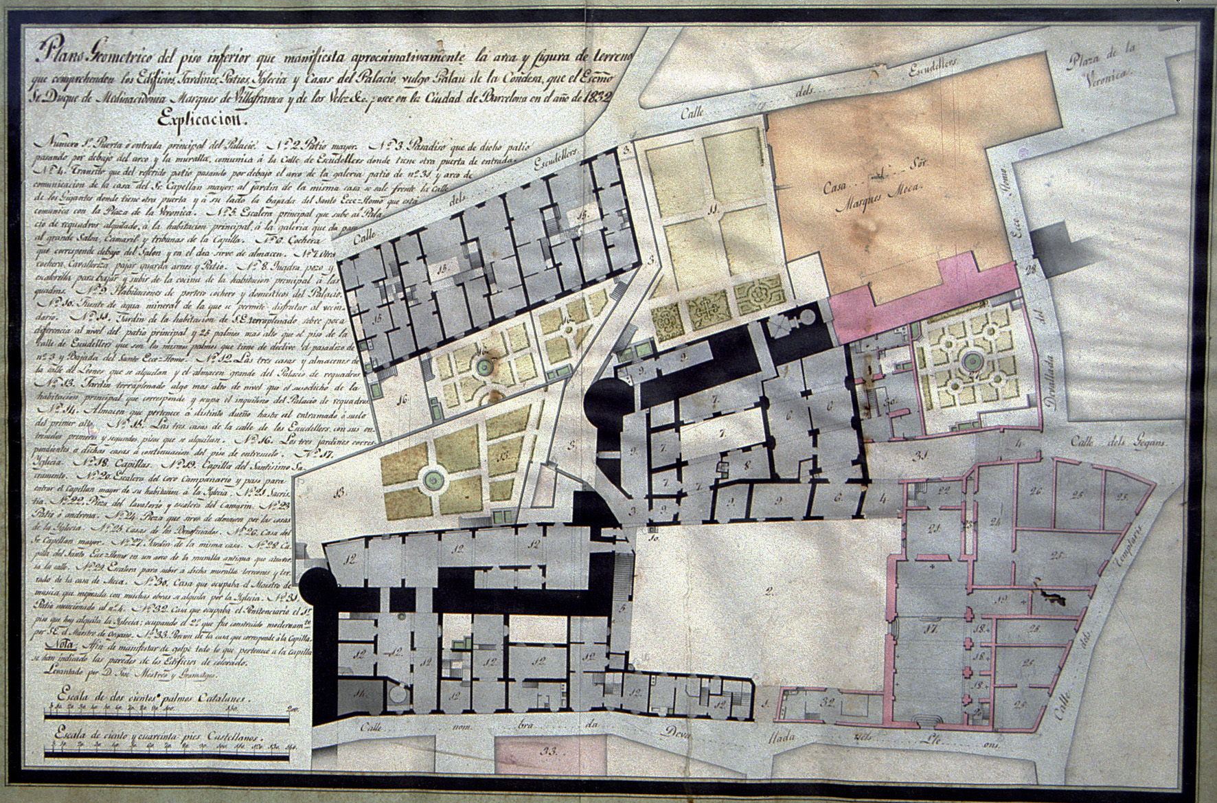 Barcelona. Planta del Palau Menor, s. XIX (Arxiu de Palau).